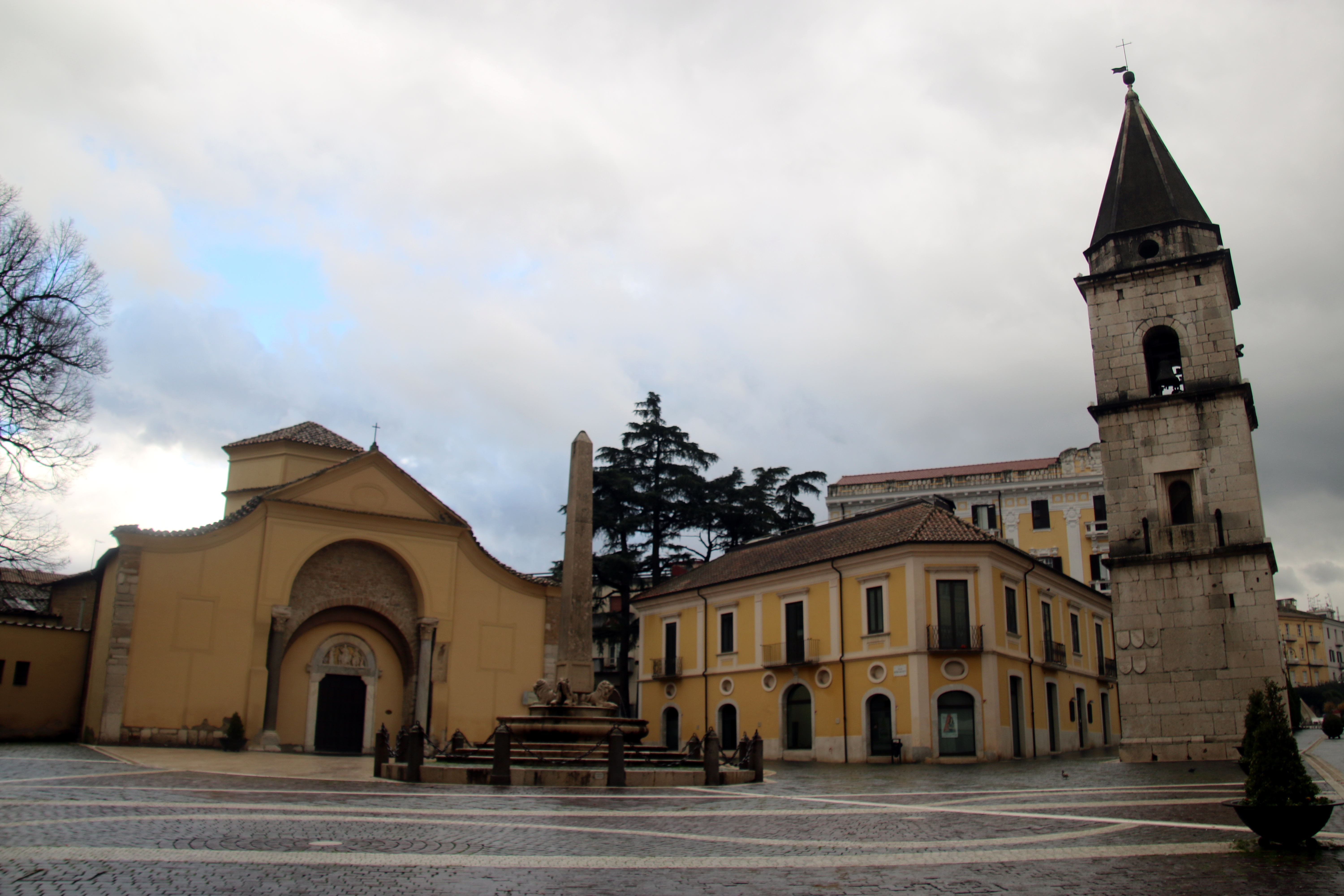 Chiesa di Santa Sofia (Benevento), esterno